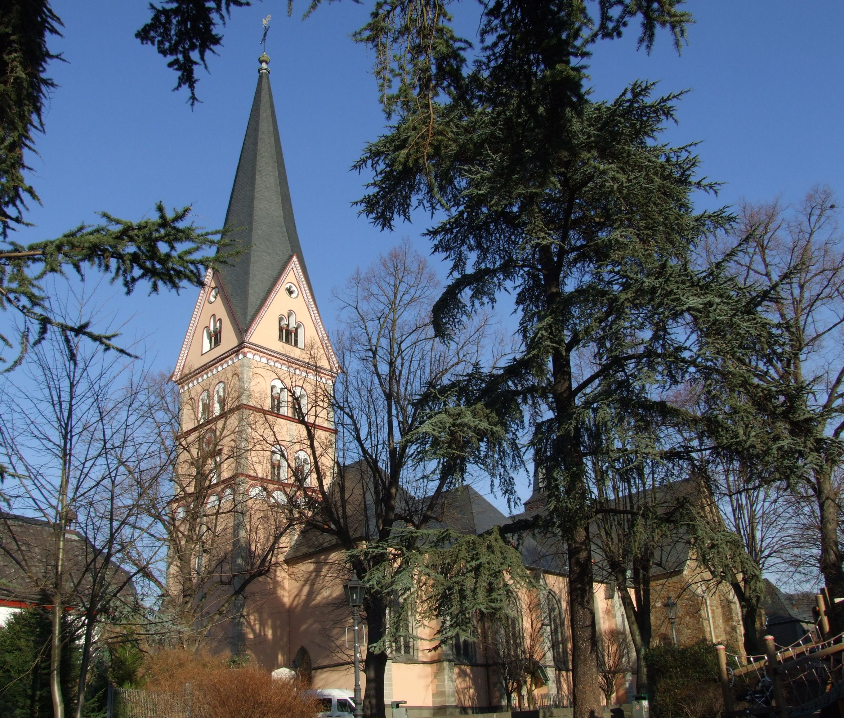 Kirche St. Johann Baptist, Wahrzeichen von Bad Honnef